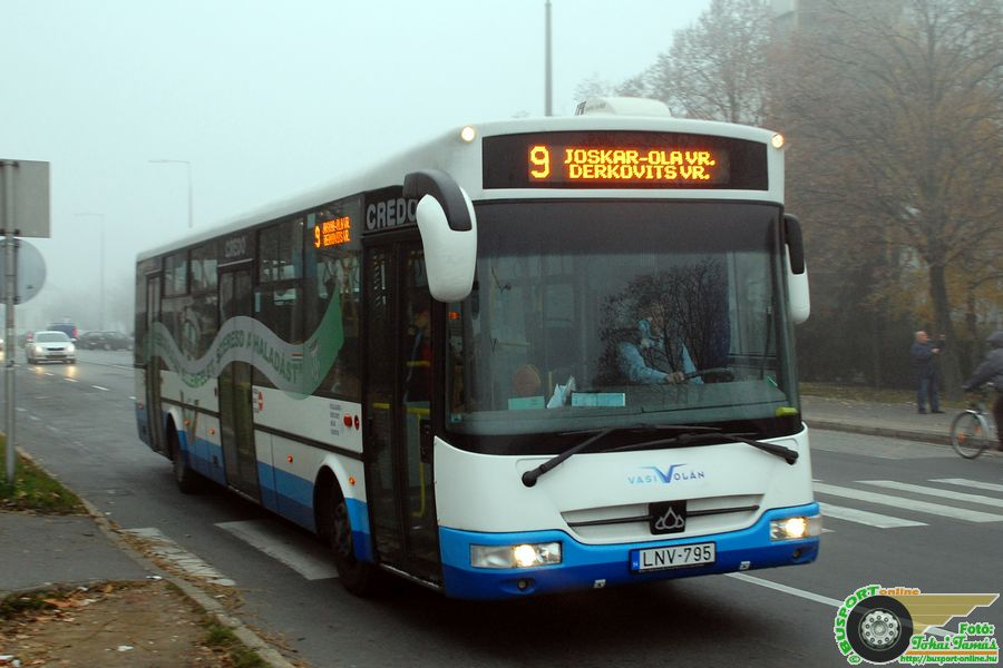 9-es busz, Szombathely, Ady Endre tér